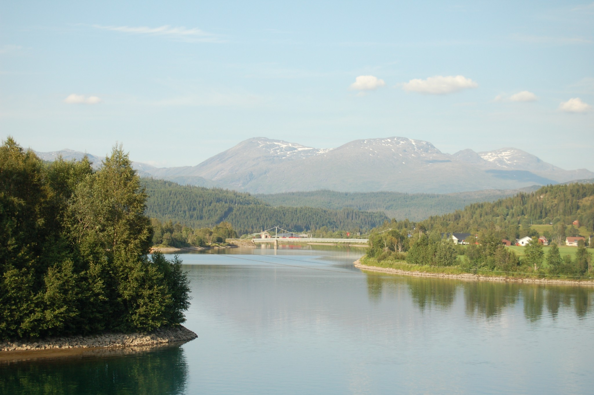 27. juli 2006 Norge, Dunderlandsdalen